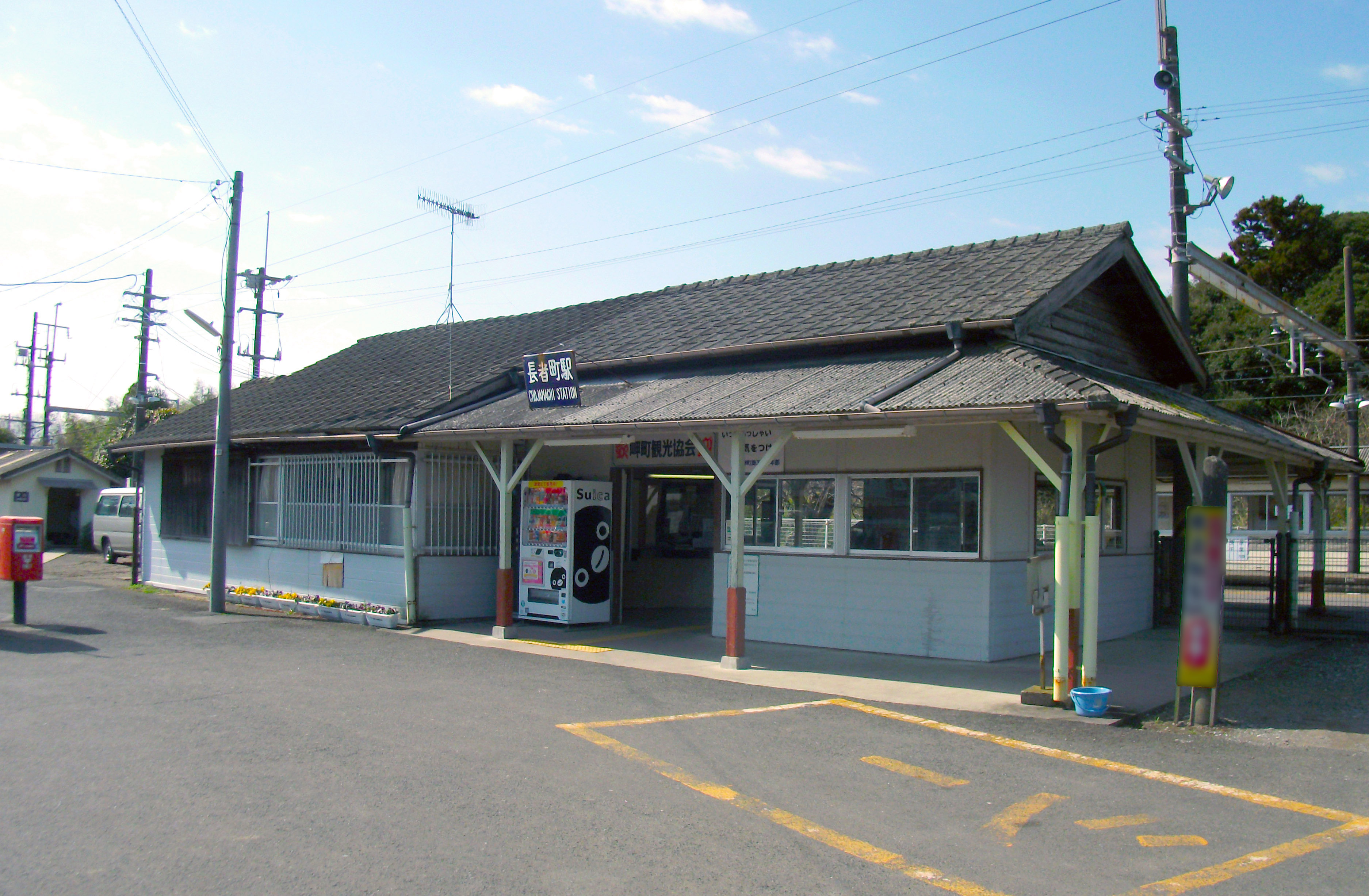 ＪＲ外房線 長者町駅